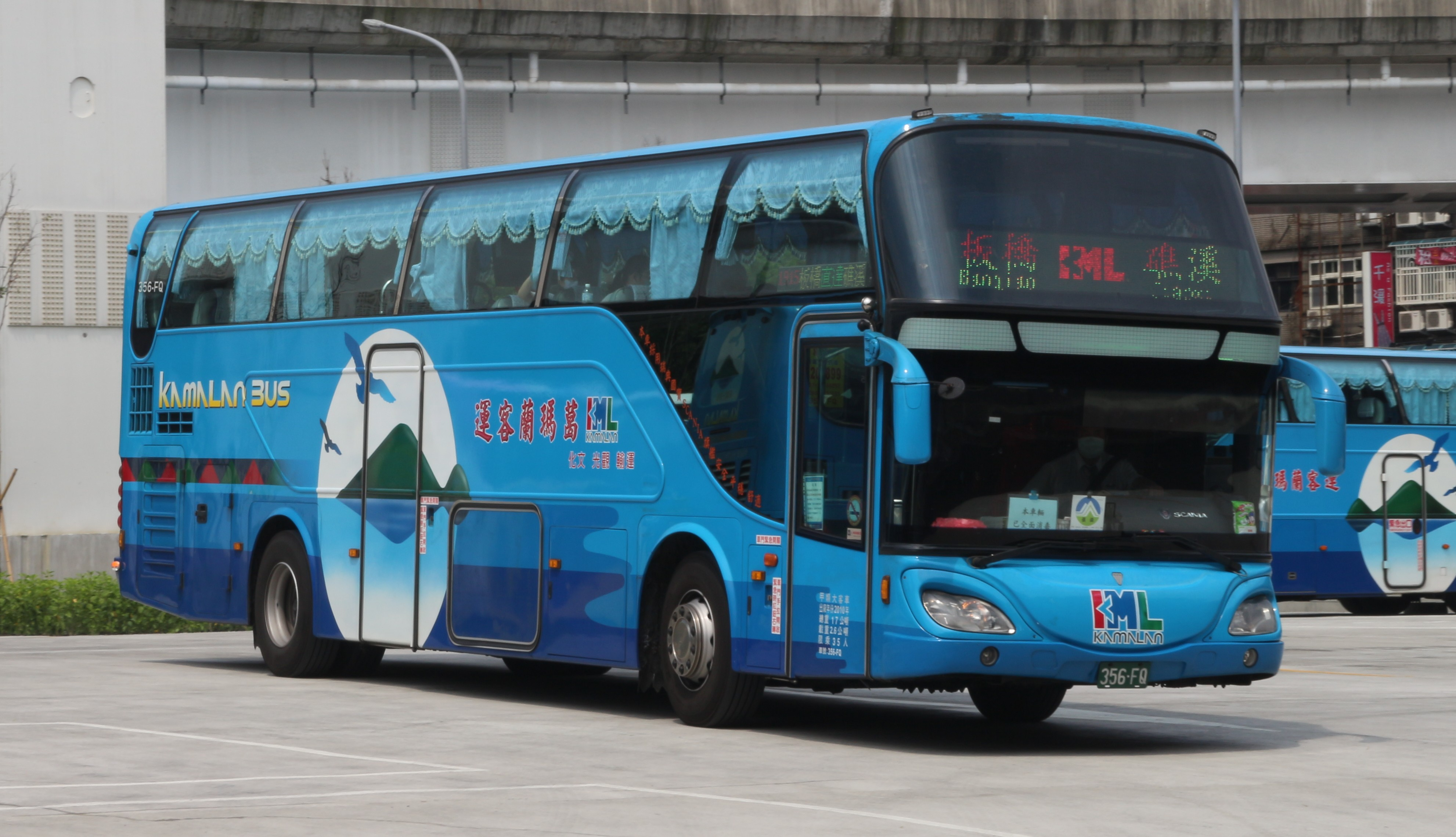 葛瑪蘭客運 2010 SCANIA K380IB4X2NB 356-FQ